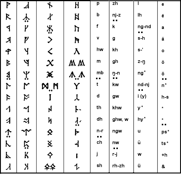 Die Angerthas von Daeron und von Moria mit Buchstabenentsprechung